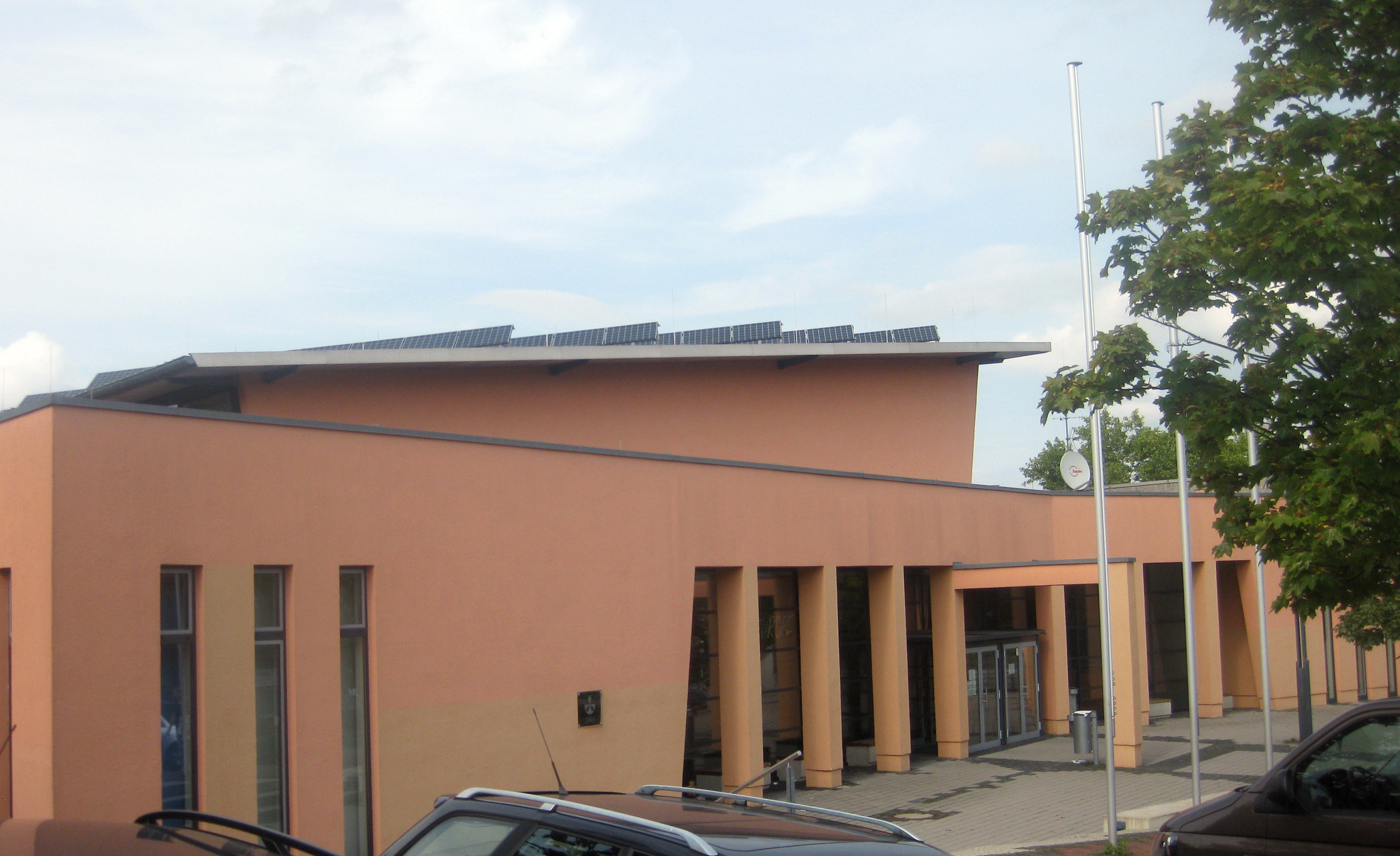 Multifunktionshalle in Lohfelden